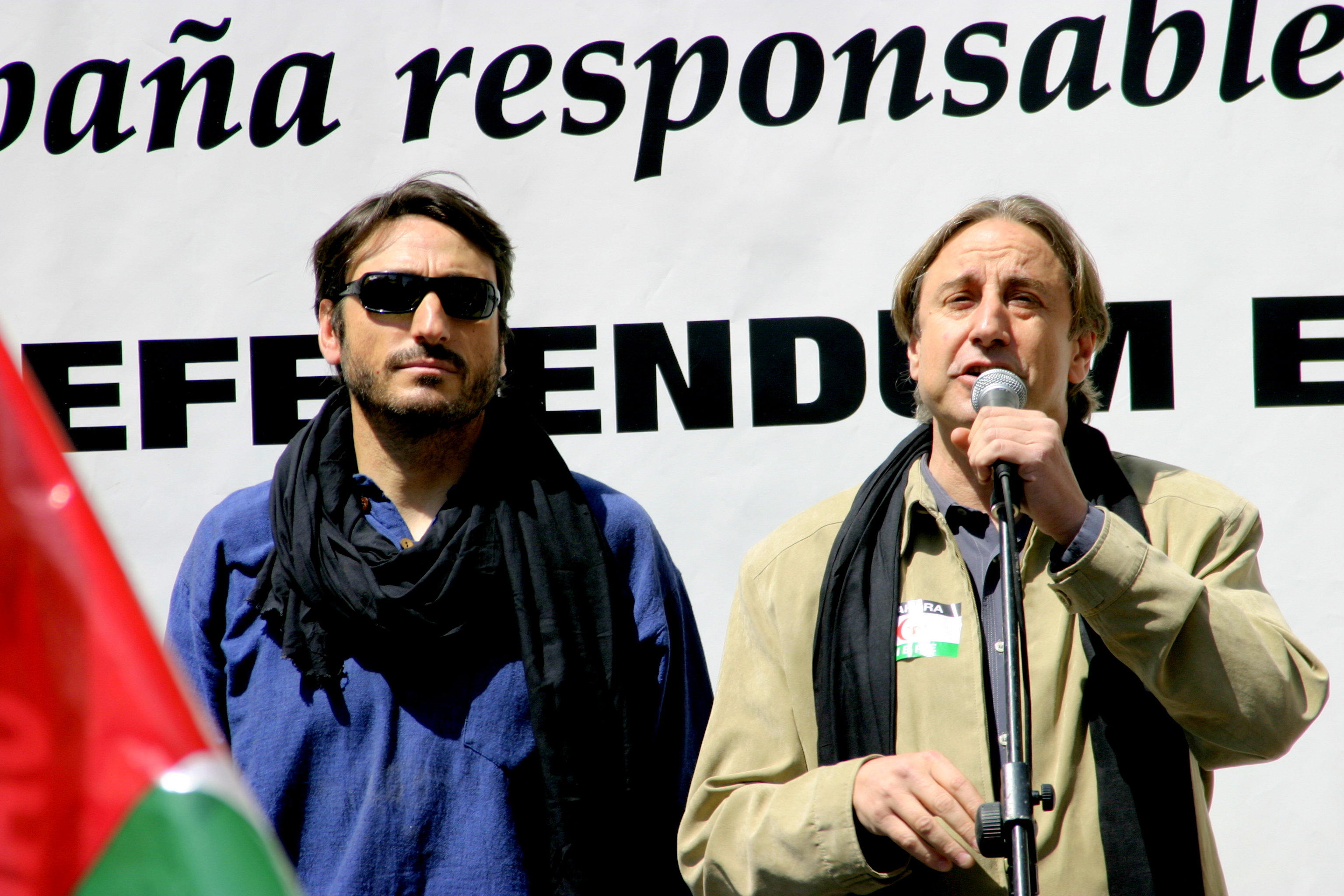 Carmelo Gómez y Juanjo Puigcorbé en un acto en apoyo del pueblo saharaui en Madrid, el 21 de abril de 2007.